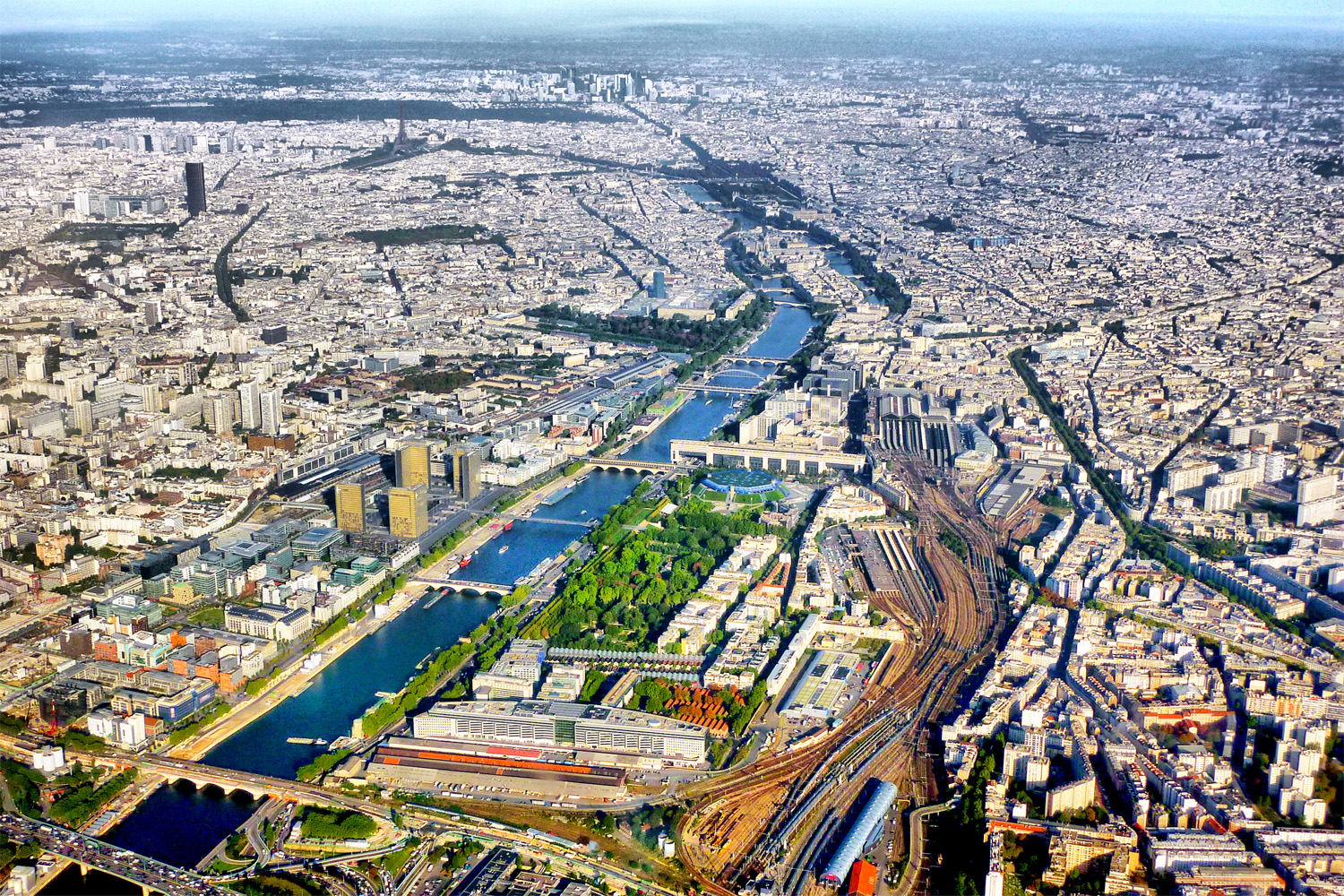 Paris